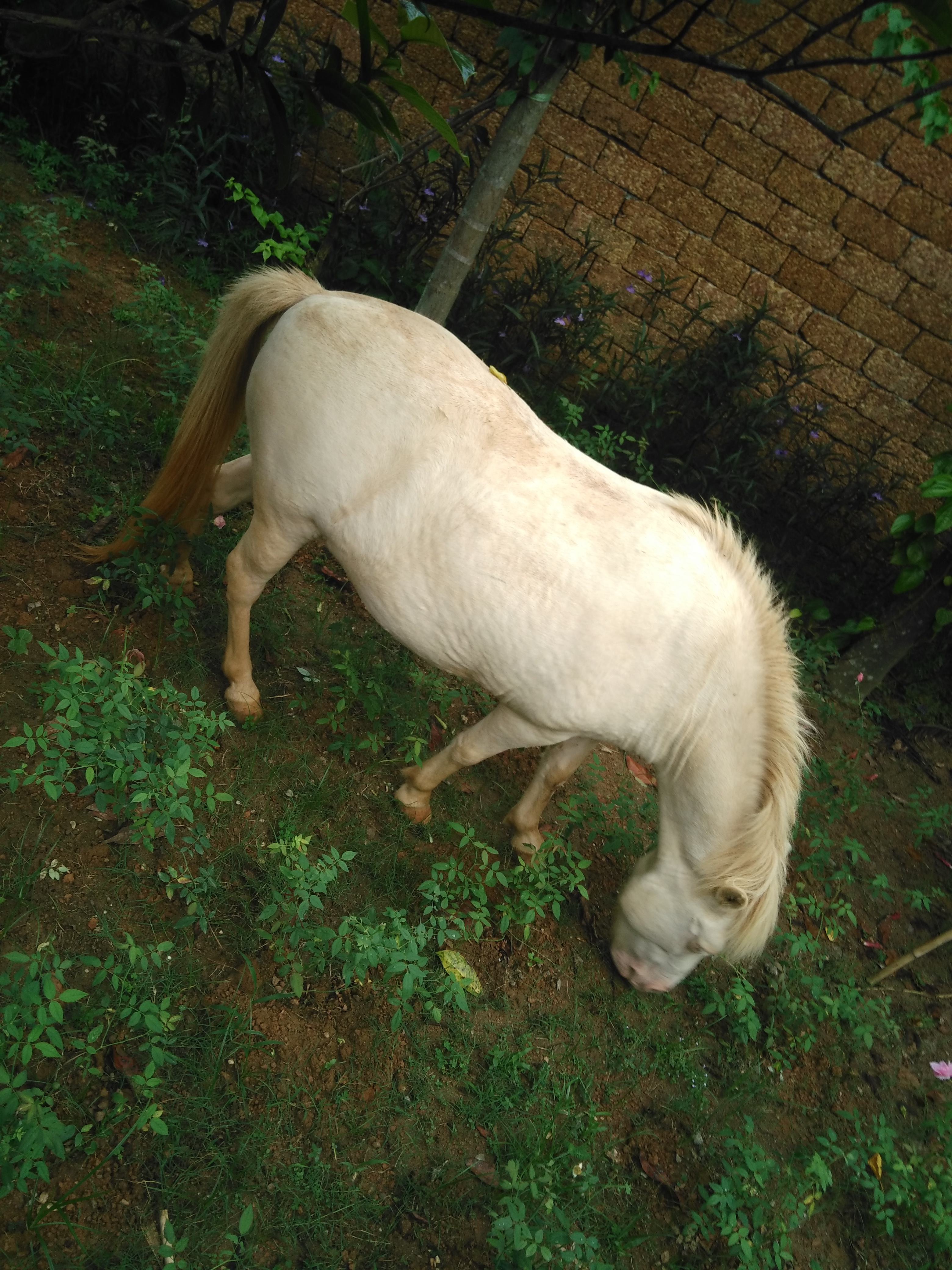 Hinh tự chụp bằng máy cá nhân về một con ngựa bạch Việt tại Trung Sơn Trầm, Sơn Tây